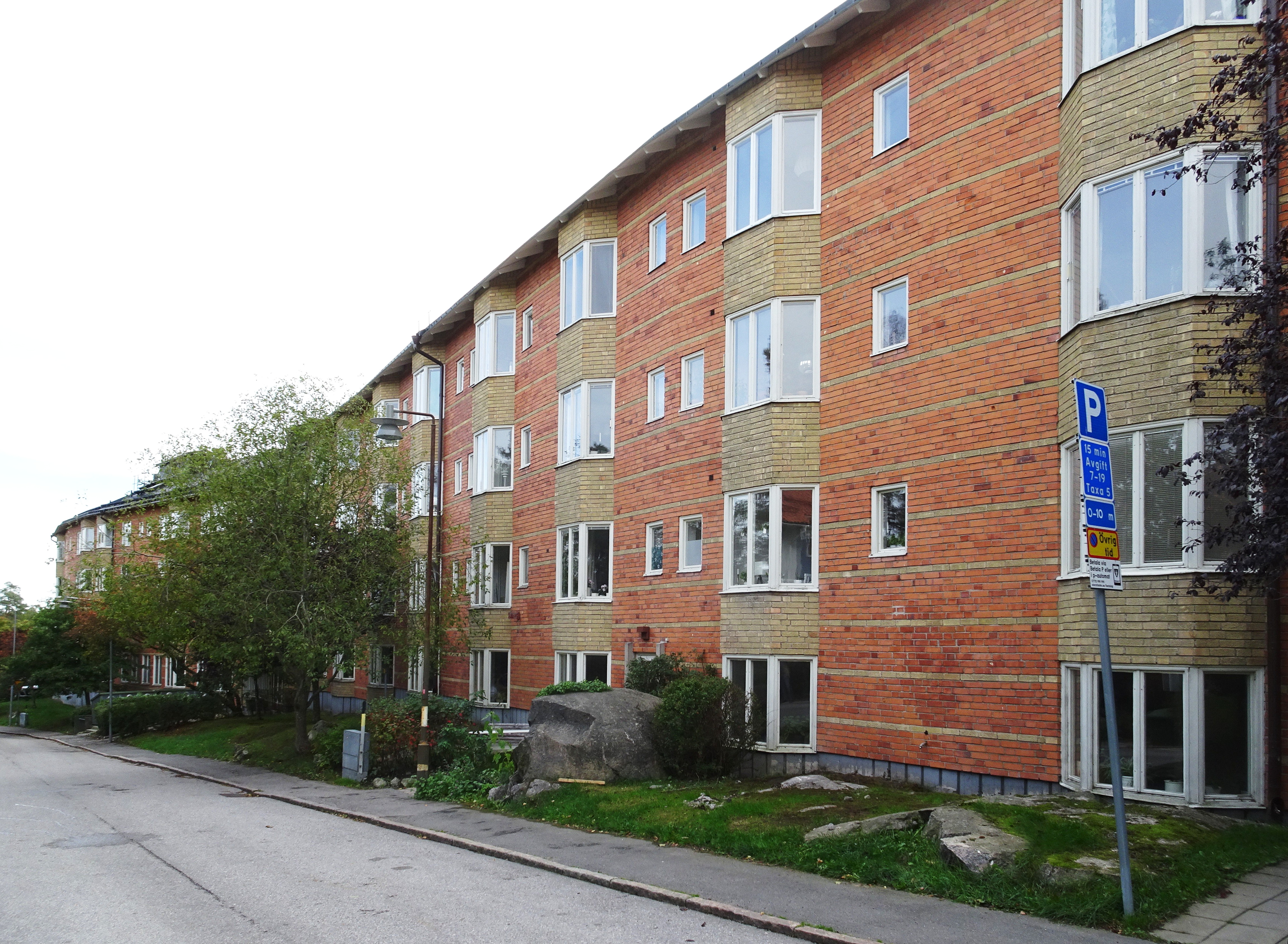 Nockeby familjehotell vid Gubbkärrsvägen 29, arkitekt Backström & Reinius, 1950